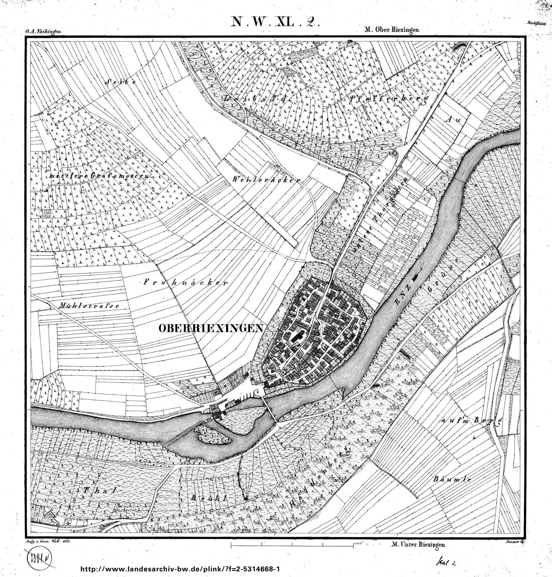 Oberriexingen auf Blatt NW 40/2 (Schicht NW XL, Blatt 2) der württembergischen Urflurkarte (1832)